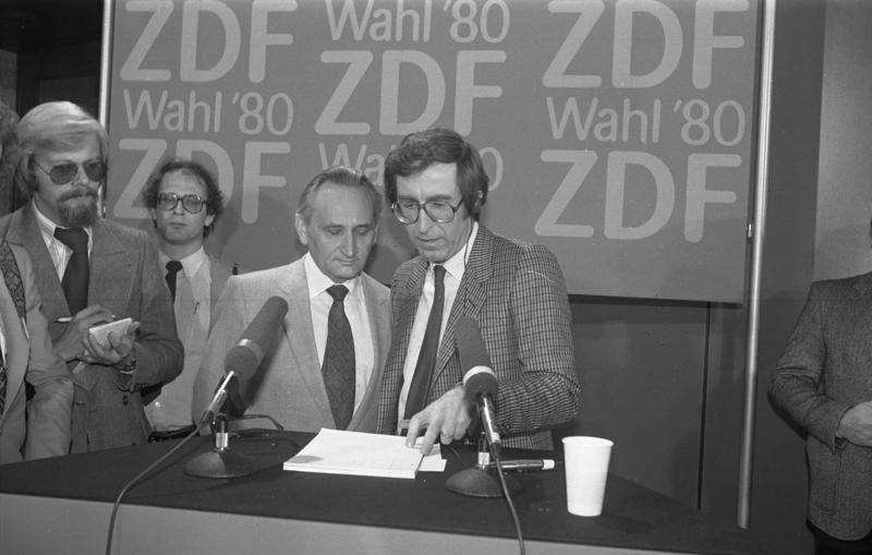 Bundestagswahl: SPD-Wahlparty im Erich-Ollenhauer-Haus in Bonn.